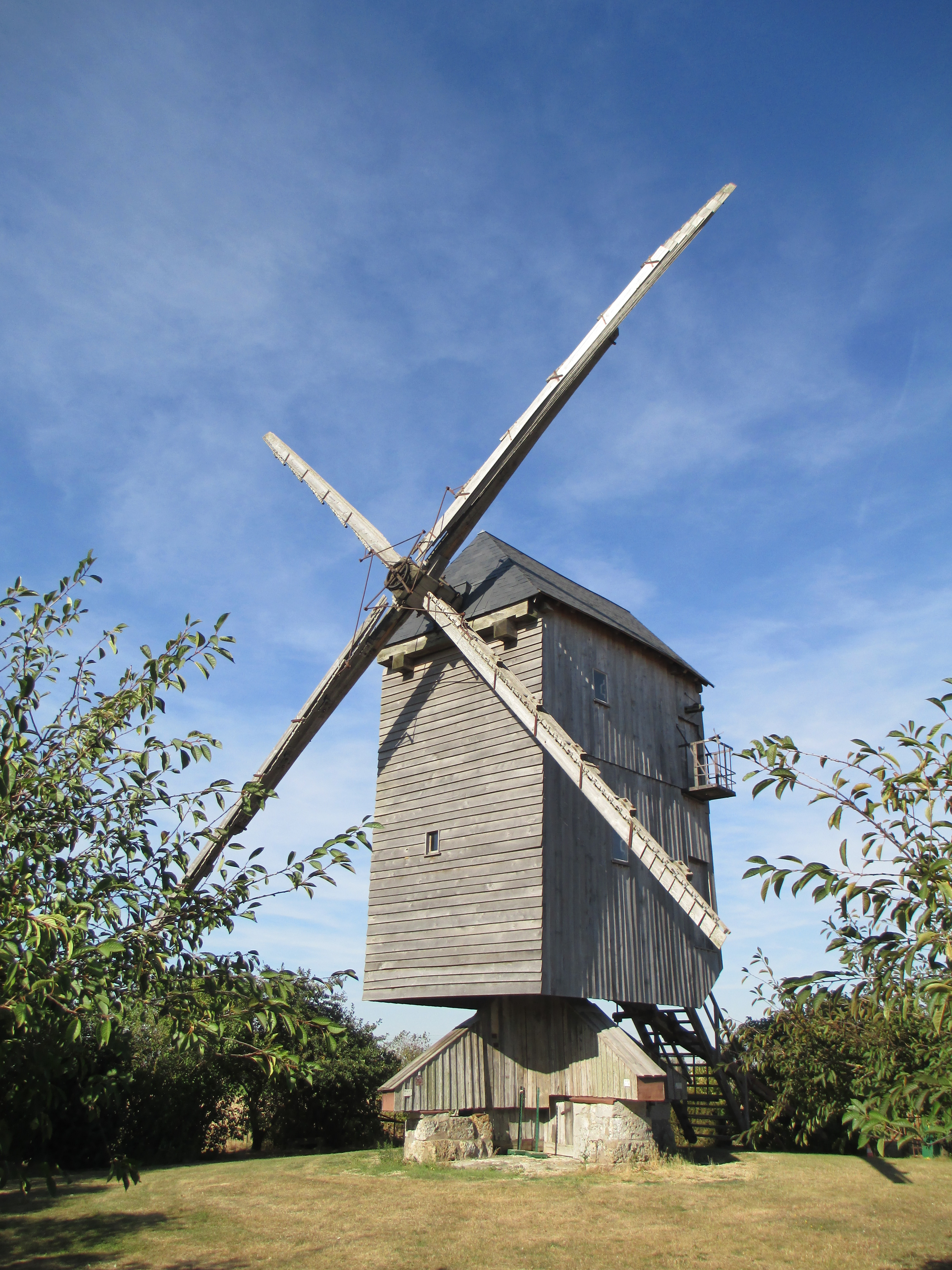 Moulin du Chesnay sur la commune de Moutiers (Eure-et-Loir). .